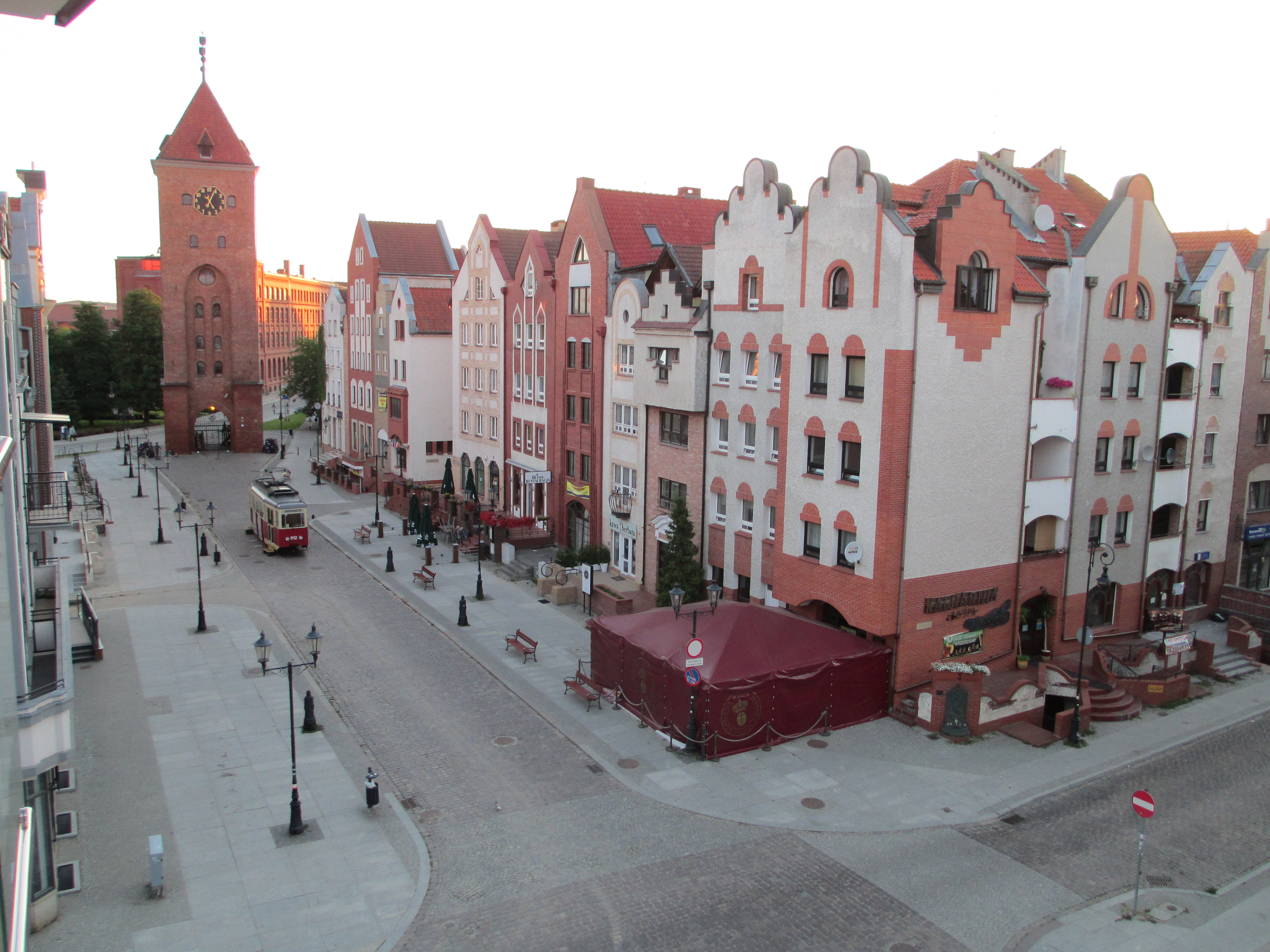 אלבלונג, פולין